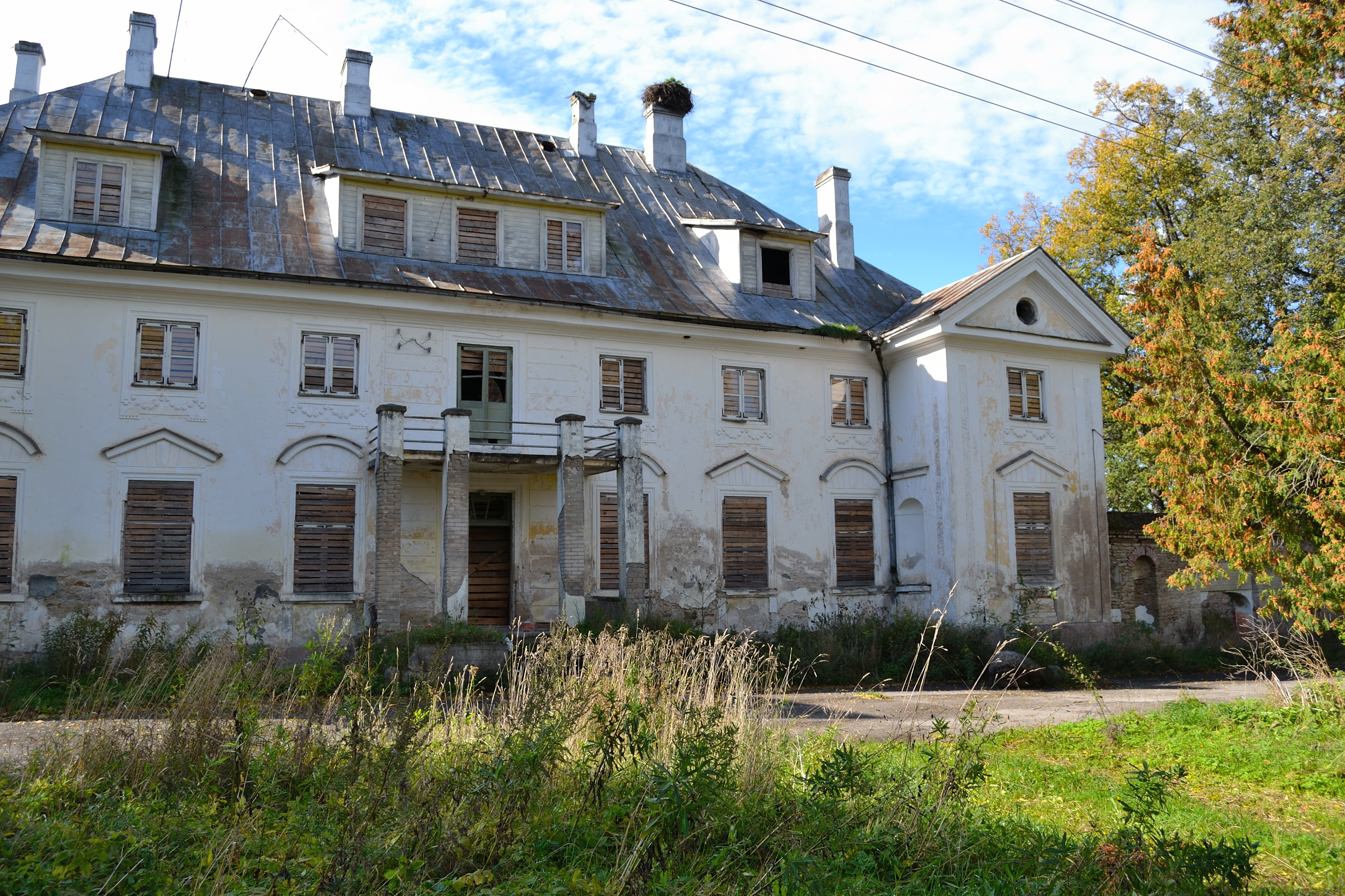 Purila mõisa peahoone